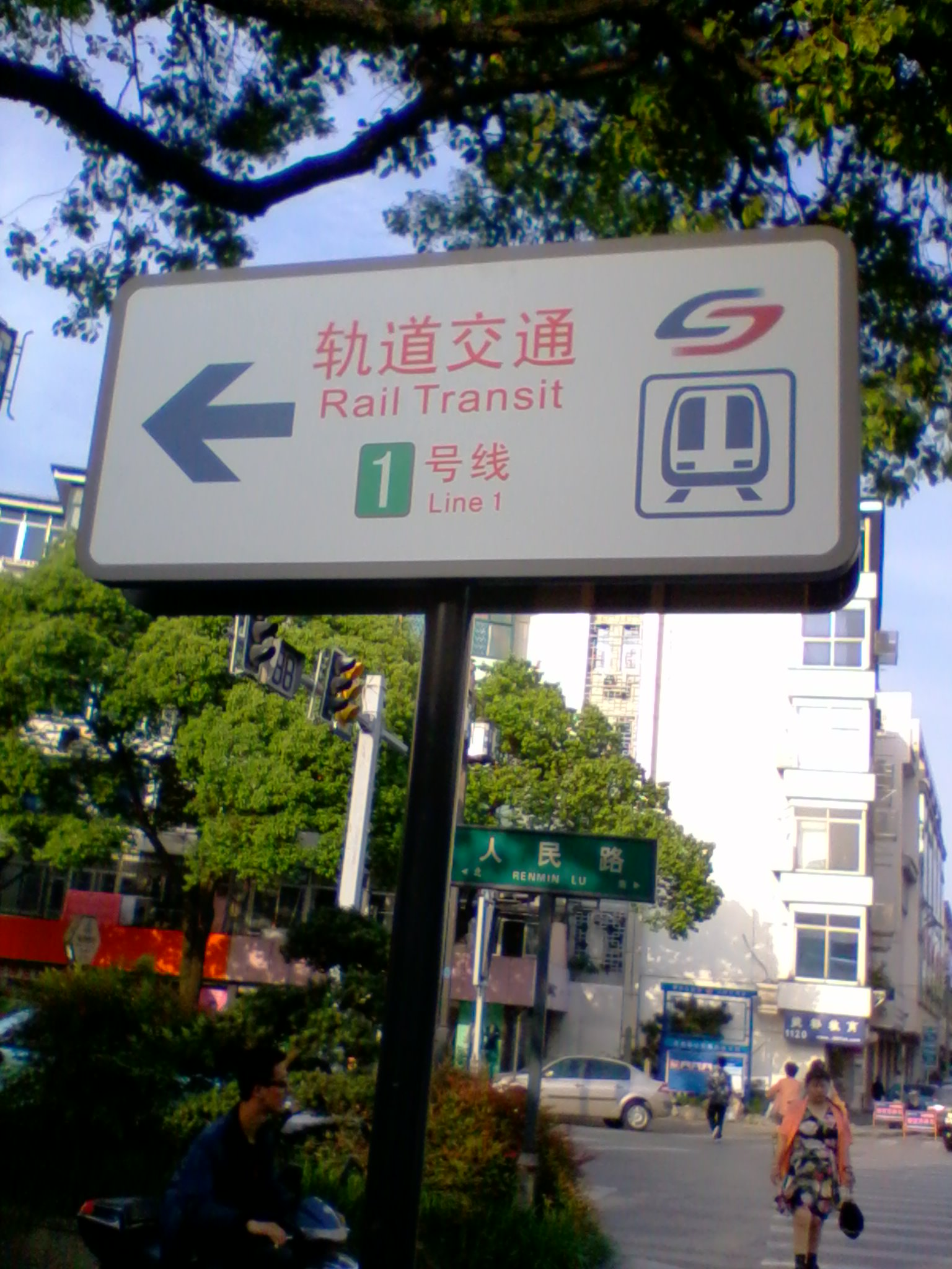 苏州地铁指示牌，Huhaoyu321摄影于2012年4月28日